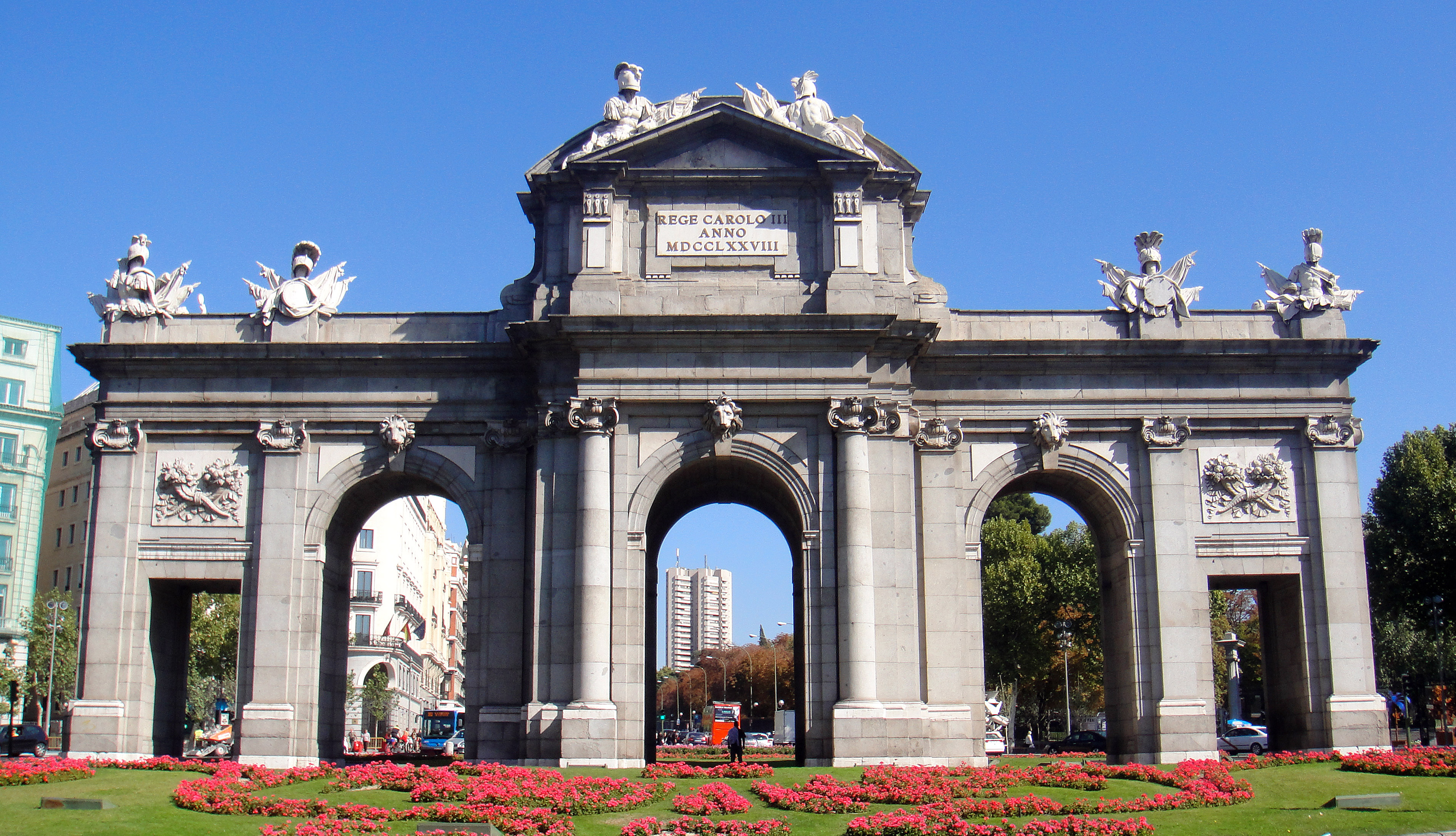 La Puerta de Alcalá de Madrid en 2010